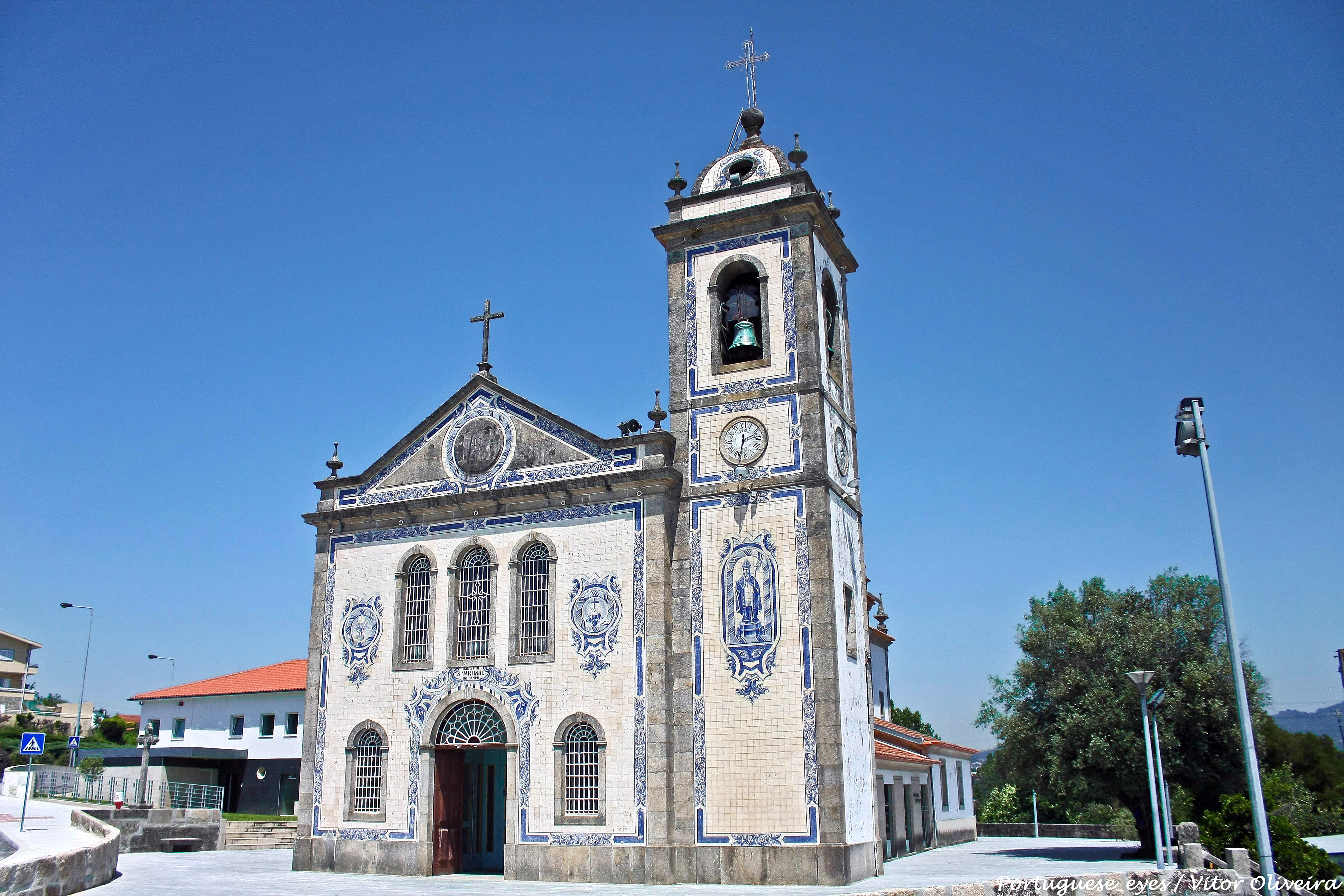 Iniciada a sua construção já no século XX teve sagração em 1910. De arquitetura neoclássica integra elementos da antiga igreja que existiu no mesmo local. Do seu interior faz parte o mais rico conjunto de imaginária barroca do concelho de Valongo. Destacam-se os altares em talha dourada e imagens de santos de grande importância dada a sua antiguidade. De destacar também o teto da capela-mor com caixotões historiados com Mistérios do Rosário e cenas da vida do seu padroeiro, S. Martinho. As paredes interiores da capela-mor possuem painéis azulejares e o corpo da igreja possui paredes e teto pintados. Numa das sacristias encontram-se azulejos figurativos do séc. XVIII, dispostos aleatoriamente mas que deixam antever a relação com a vida de S. Jerónimo. O corpo da igreja possui planta retangular de uma só nave e tem torre sineira. A frontaria é revestida a azulejo branco com ornamentação figurativa azul com motivos religiosos. Arquitetonicamente inspira-se na igreja matriz de Valongo e esta por sua vez na igreja da Lapa, Porto. Nas imediações do templo encontramos cruzeiro, casa paroquial, centro social e paroquial, assim como a quinta fronteira, Quinta do Visconde, implantada em terrenos do antigo passal e agora pertencente à paróquia.